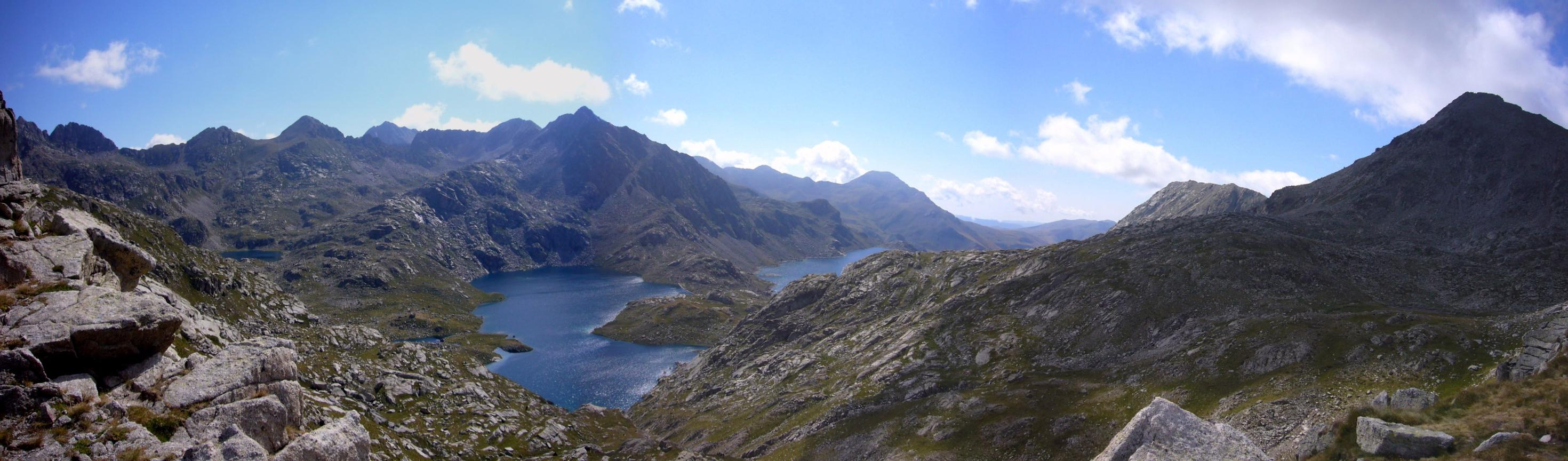 Vall Fosca vista des de la Collada de Dellui; la Vall de Boí, Alta Ribagorça, Catalunya